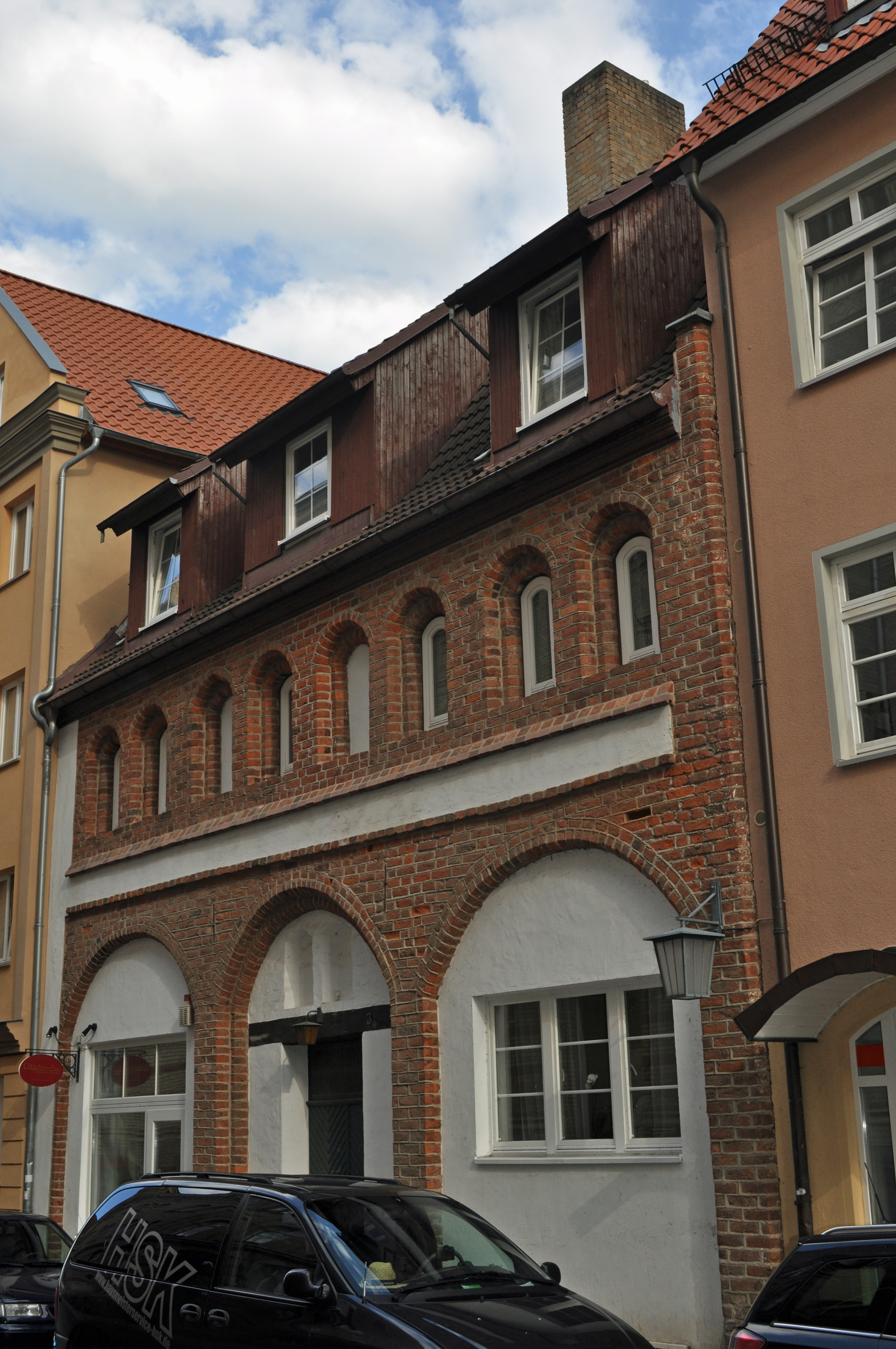 Das Foto zeigt ein Haus (bzw. Details des Hauses) in der Frankenstraße in Stralsund, Deutschland. Die Hausnummer steht im Dateinamen. Aufgenommen am 19. Juli 2011 vom Benutzer:Klugschnacker.